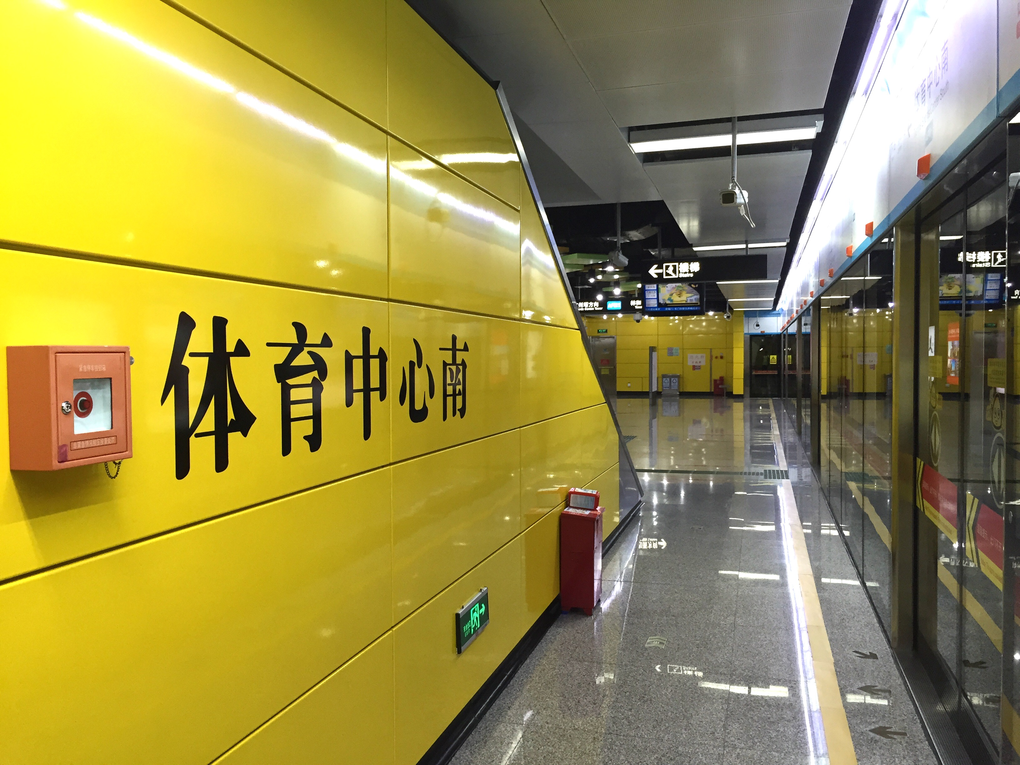 广州地铁体育中心南站